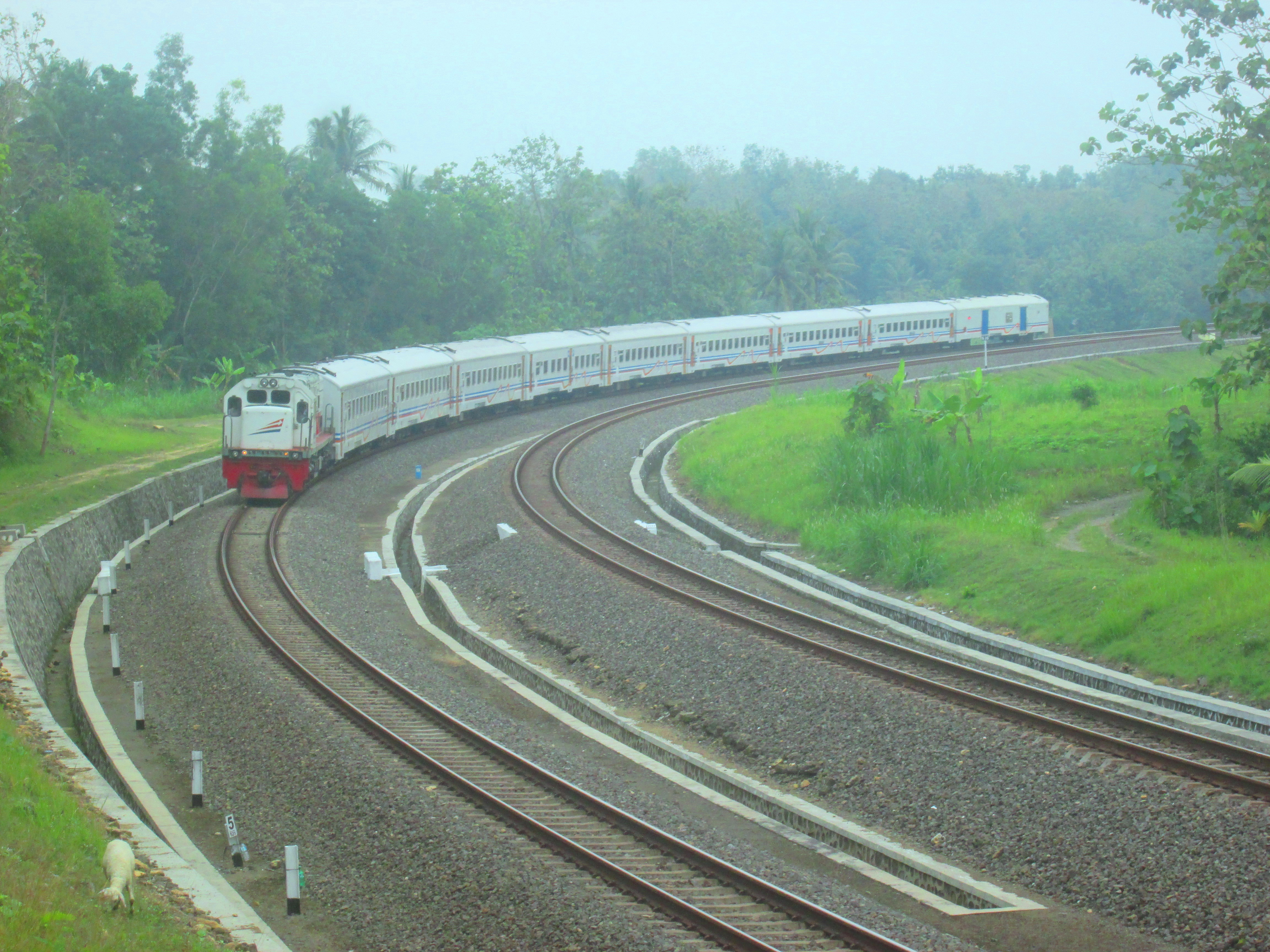 CC 201 92 19 menarik KA Bengawan di tikungan Kalimenur.